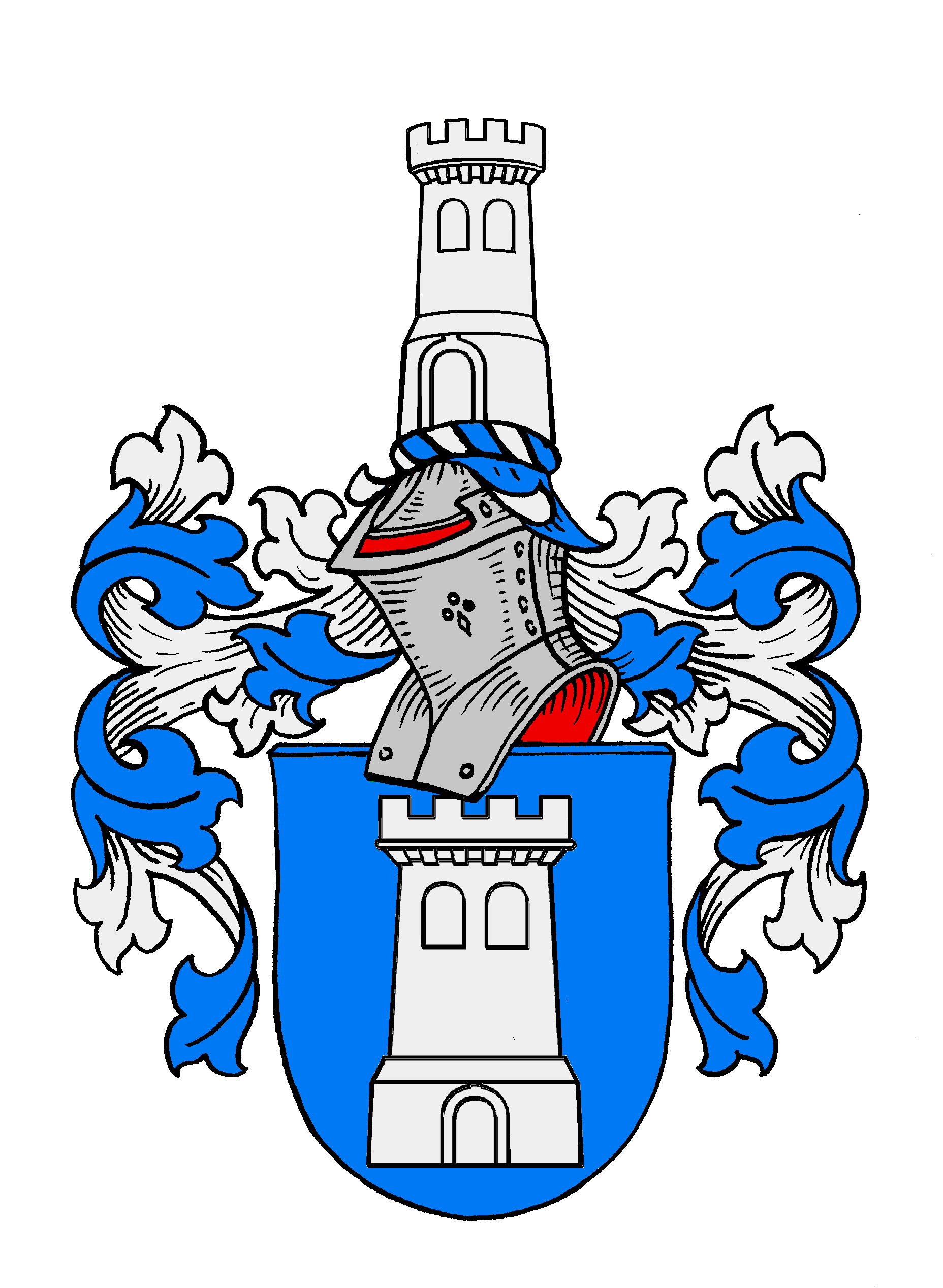 Stammwappen I der Dellingshausen, aus dem Solling stammendes Geschlecht, 1411 urk. mit Cord Dellinghusen, Bürger zu Einbeck, in Reval mit Hinrik Dellingkhusen, urk. 1479—1511, Kaufmann und Ältermann der Großen Gilde, mit dem die Stammreihe beginnt. Schwed. Adelsstand 1680; HRR-Adelsstand und Freiherrenstand 1785